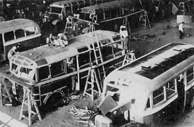 Kawasaki Sangyo, Ltd. Gifu Works, bus body manufacturing site, in 1947.